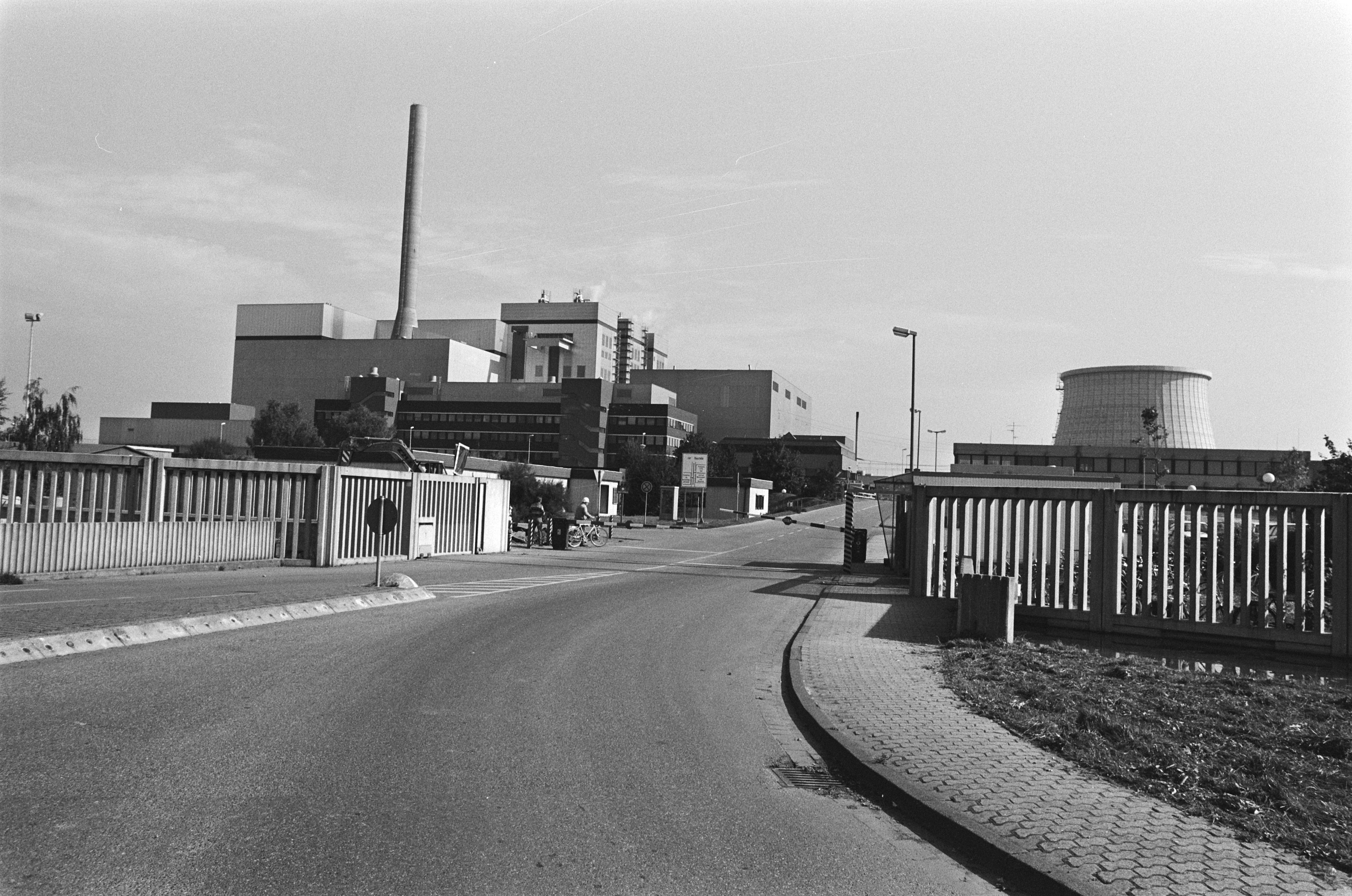 Collectie / Archief : Fotocollectie Anefo Reportage / Serie : [ onbekend ] Beschrijving : Exterieur snelle kweekreactor in Kalkar in verband met naderende voltooiing Datum : 10 september 1985 Trefwoorden : kweekreactoren, voltooiing Fotograaf : Bogaerts, Rob / Anefo Auteursrechthebbende : Nationaal Archief Materiaalsoort : Negatief (zwart/wit) Nummer archiefinventaris : bekijk toegang 2.24.01.05 Bestanddeelnummer : 933-4187